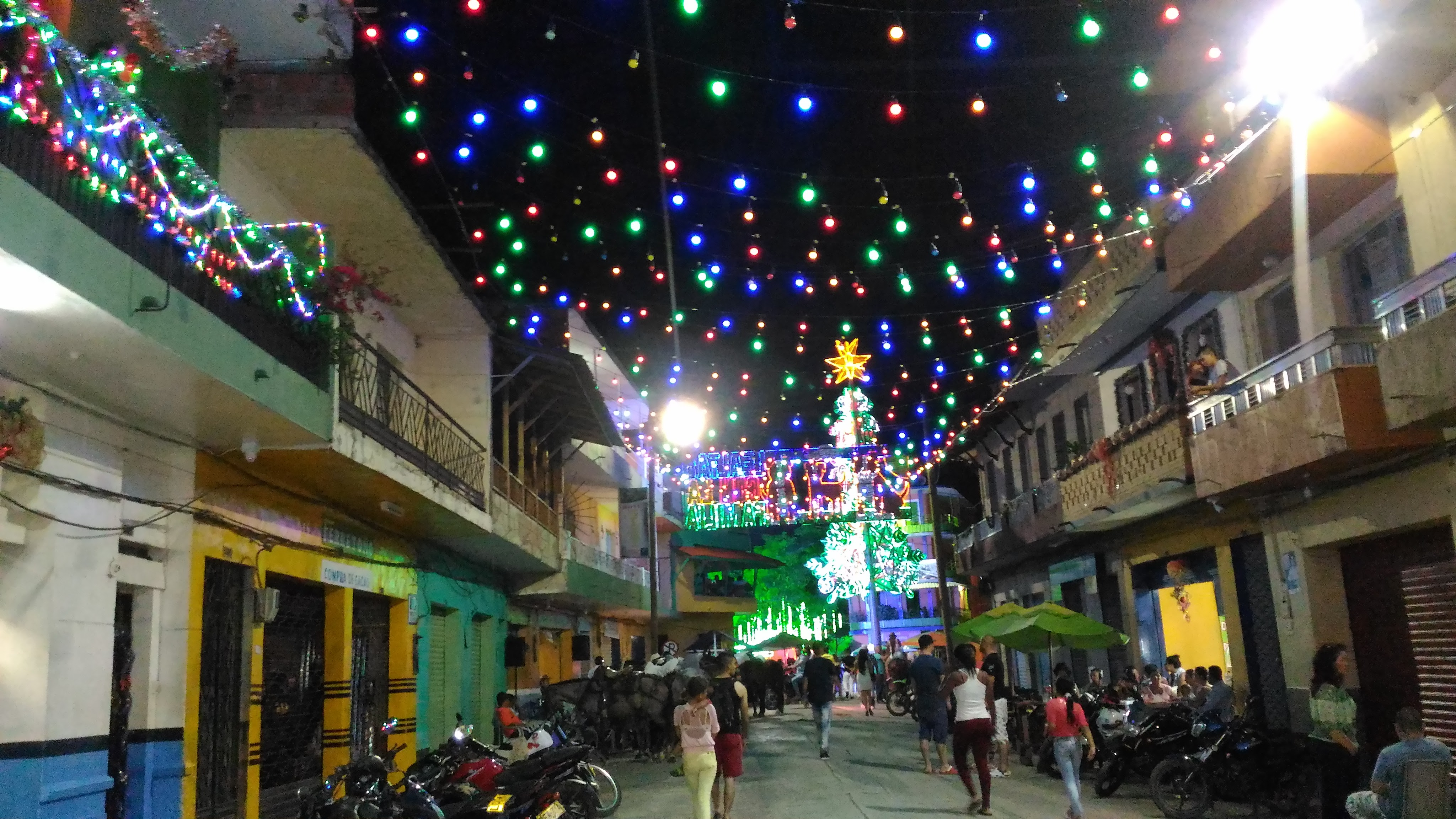 Esta fotografía fue tomada en el municipio colombiano con código 05142.